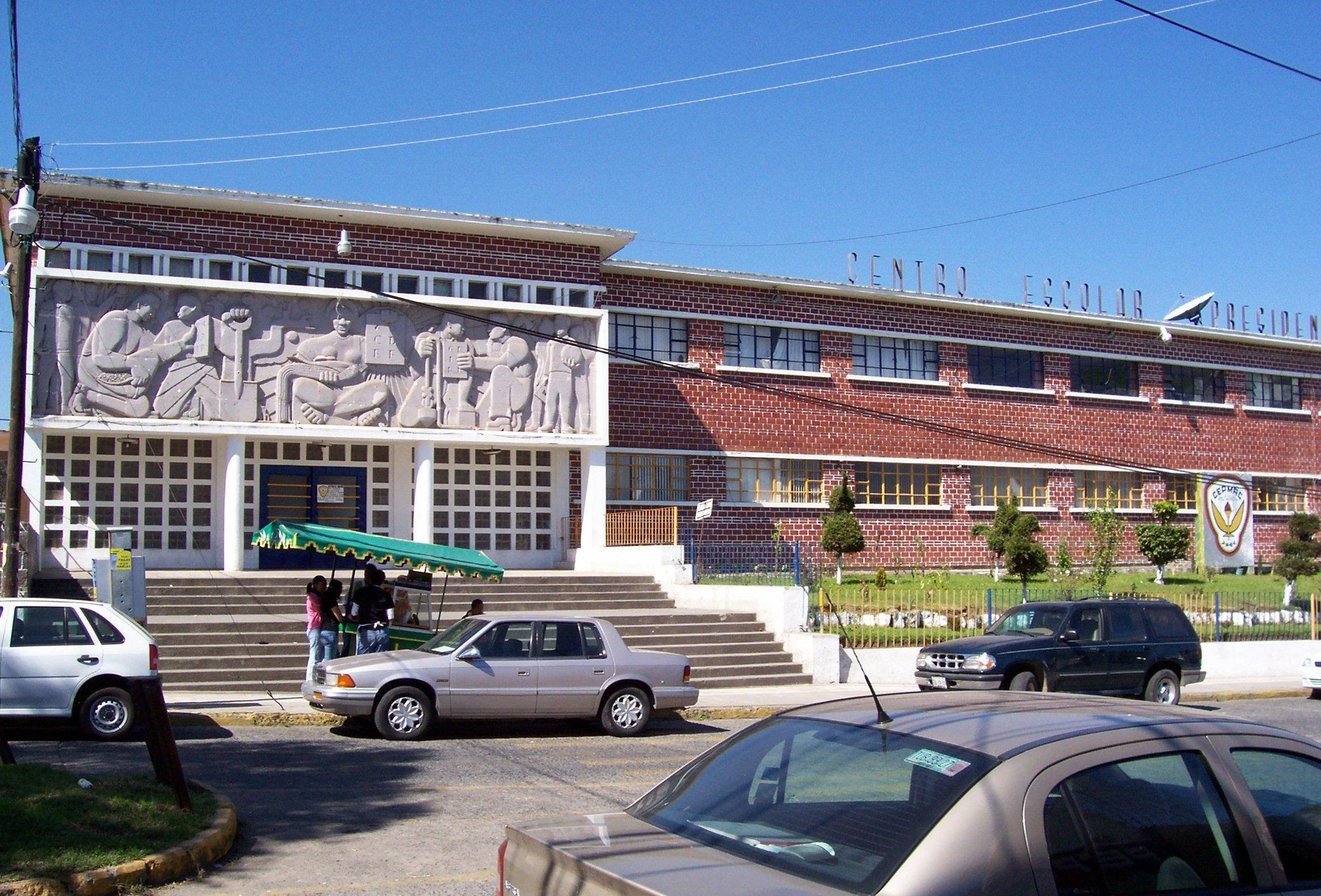 Centro Escolar Presidente Manuel Ávila Camacho (Teziutlán)